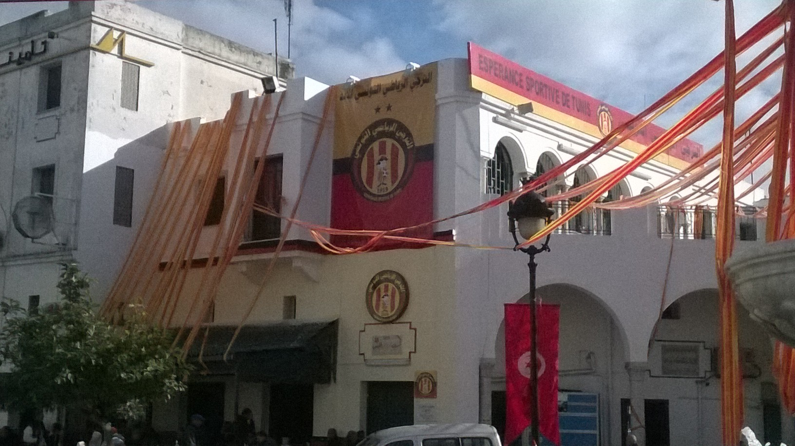 Bab Souika , Tunis باب سويقة, تونس